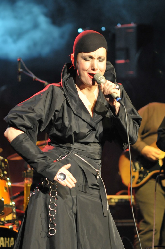 Josipa Lisac ZKM VALENTINOVO